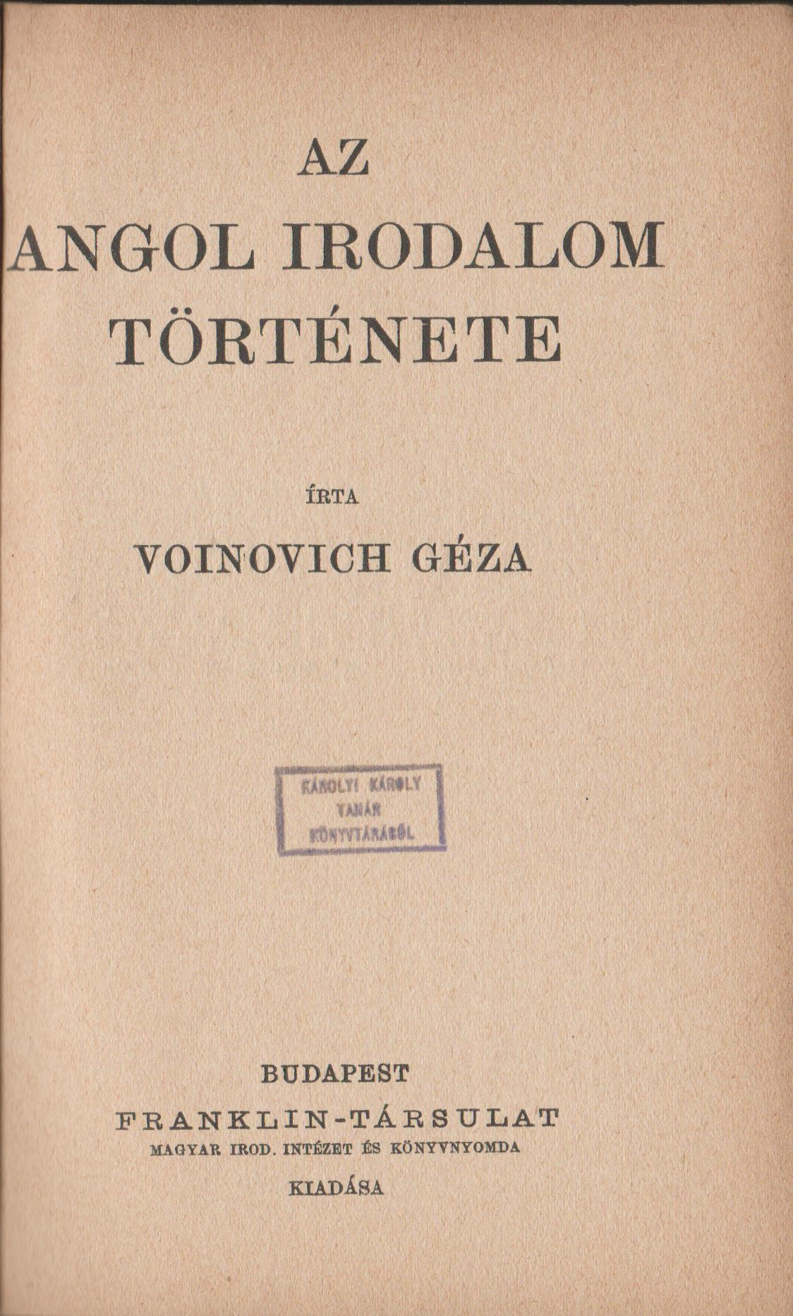 Az adott mű címlapja.